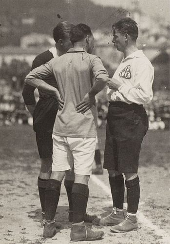 I capitani delle nazionali italiana ed olandese, Renzo De Vecchi e Cas Ruffelse, prima dell'inizio della gara amichevole disputata a Genova il 13 maggio 1920 e terminata con il risultato di 1-1.